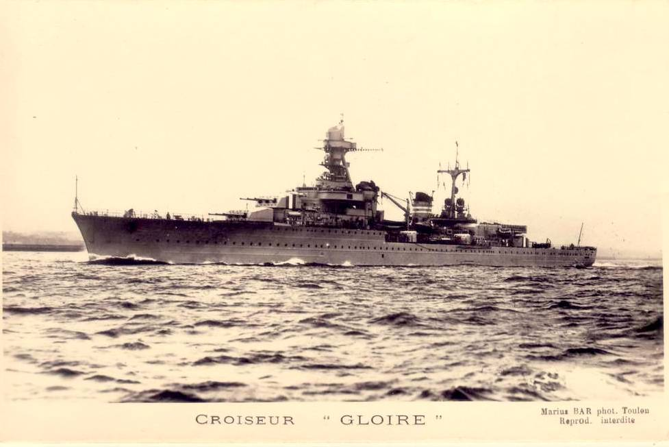 Croiseur français : Gloire